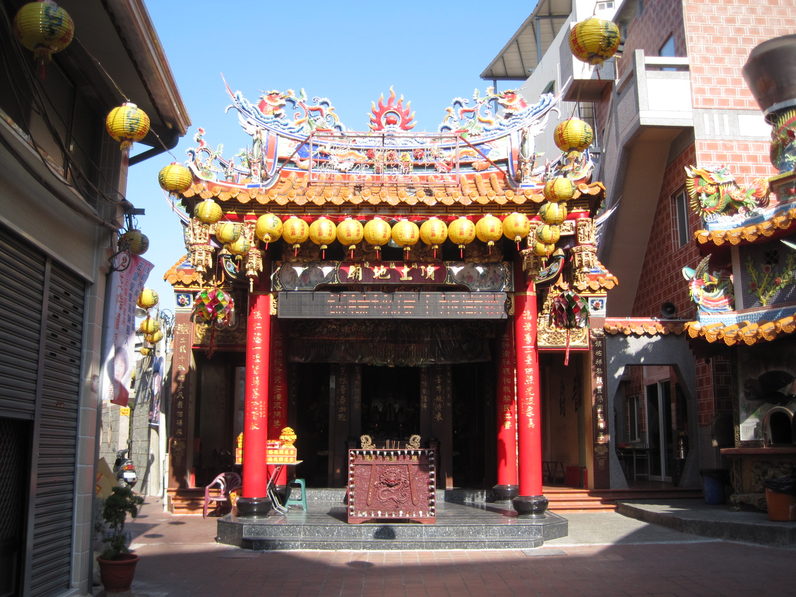 臺南市總爺古街的鎮轅境土地廟。